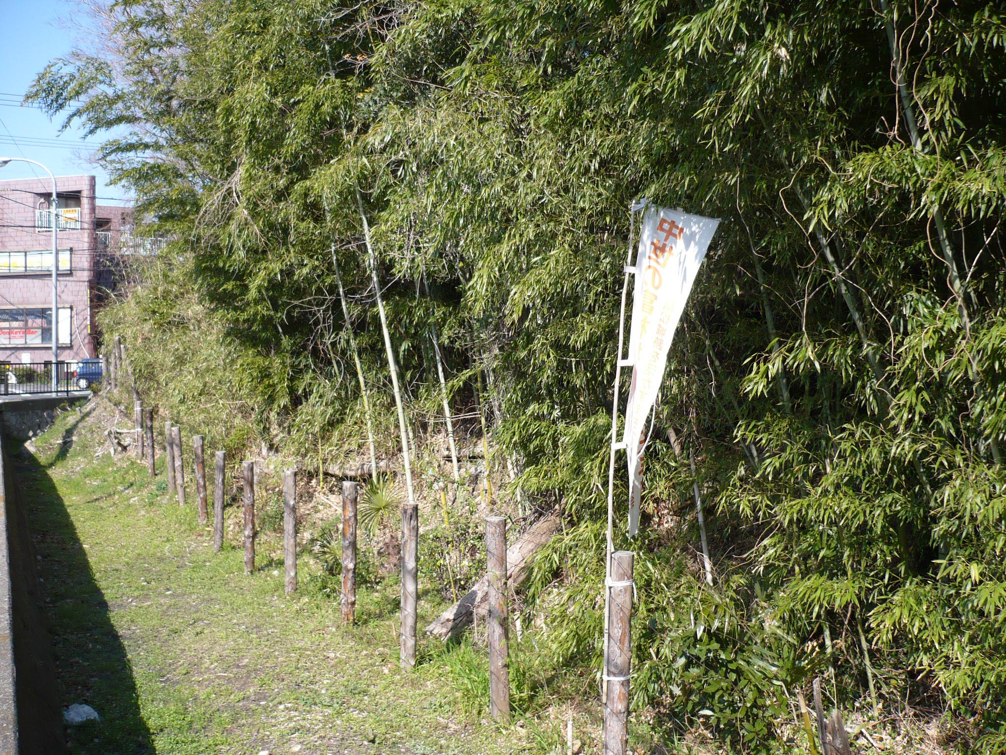 富松城の土塁と水掘跡